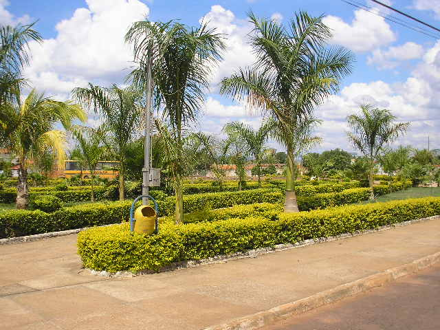 Praça central de Natalândia, Minas Gerais, Brasil. Autor: Denis A. C. Conrado.